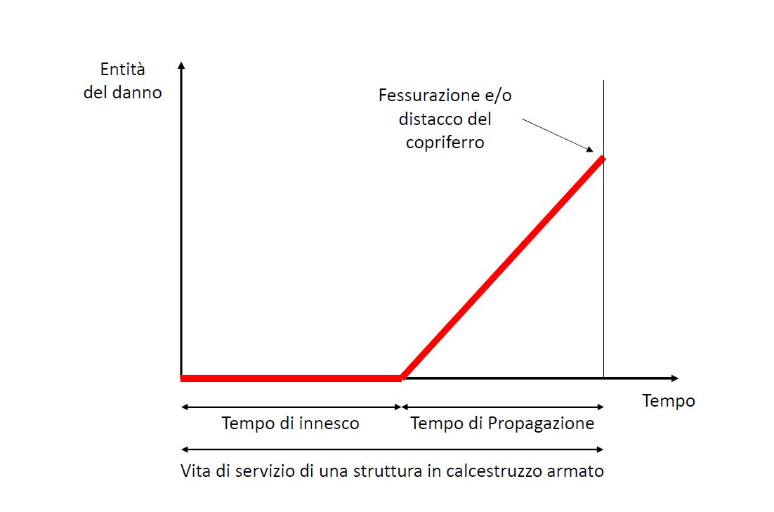 Diagramma di Tuutti, vita di servizio di una struttura in calcestruzzo armato